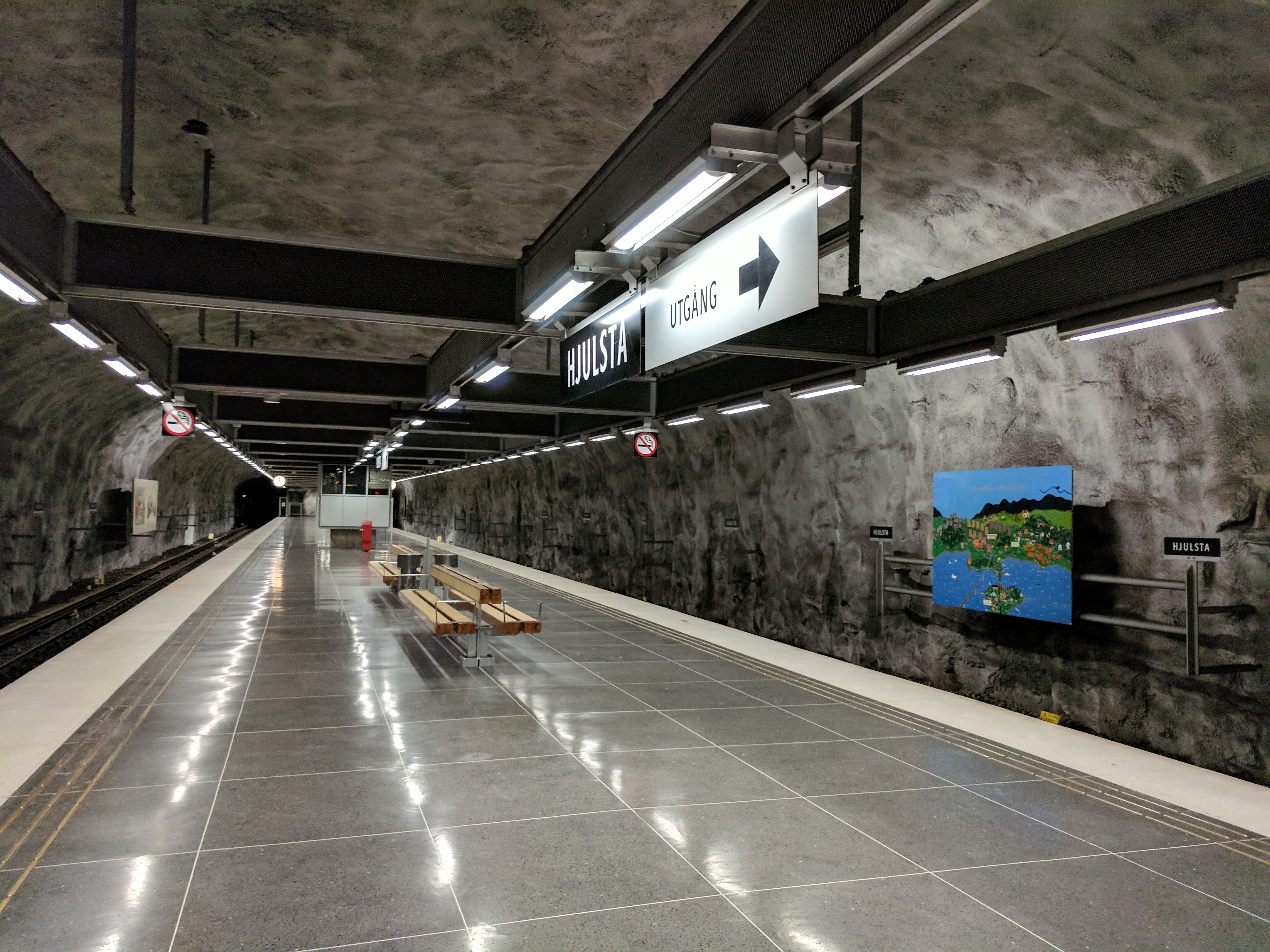 Hjulsta tunnelbana